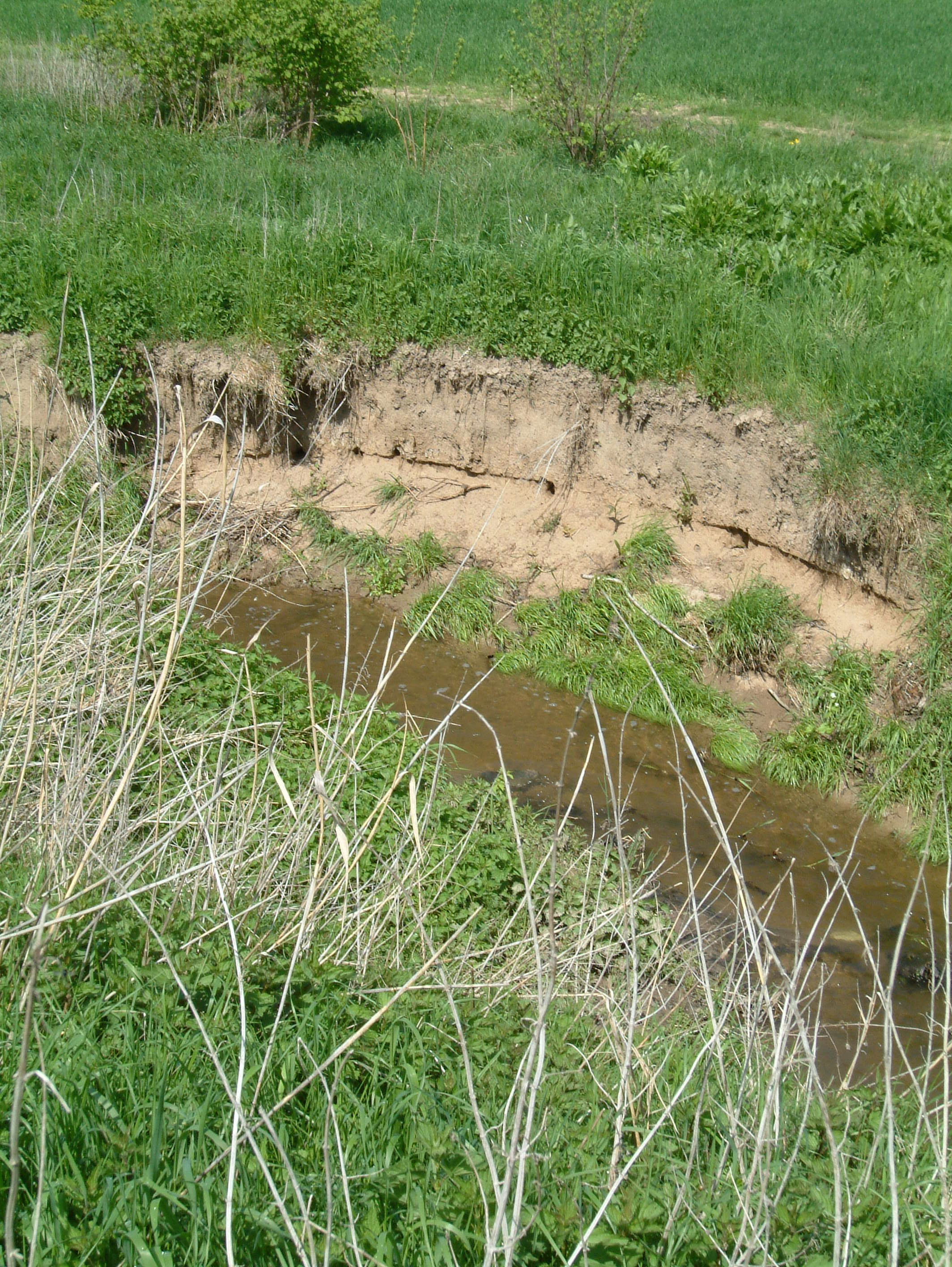 Floßbach/Landgraben zu Dirmstein, selbst fotografiert am 02.05.2006 und freigegeben durch Benutzer:Mundartpoet